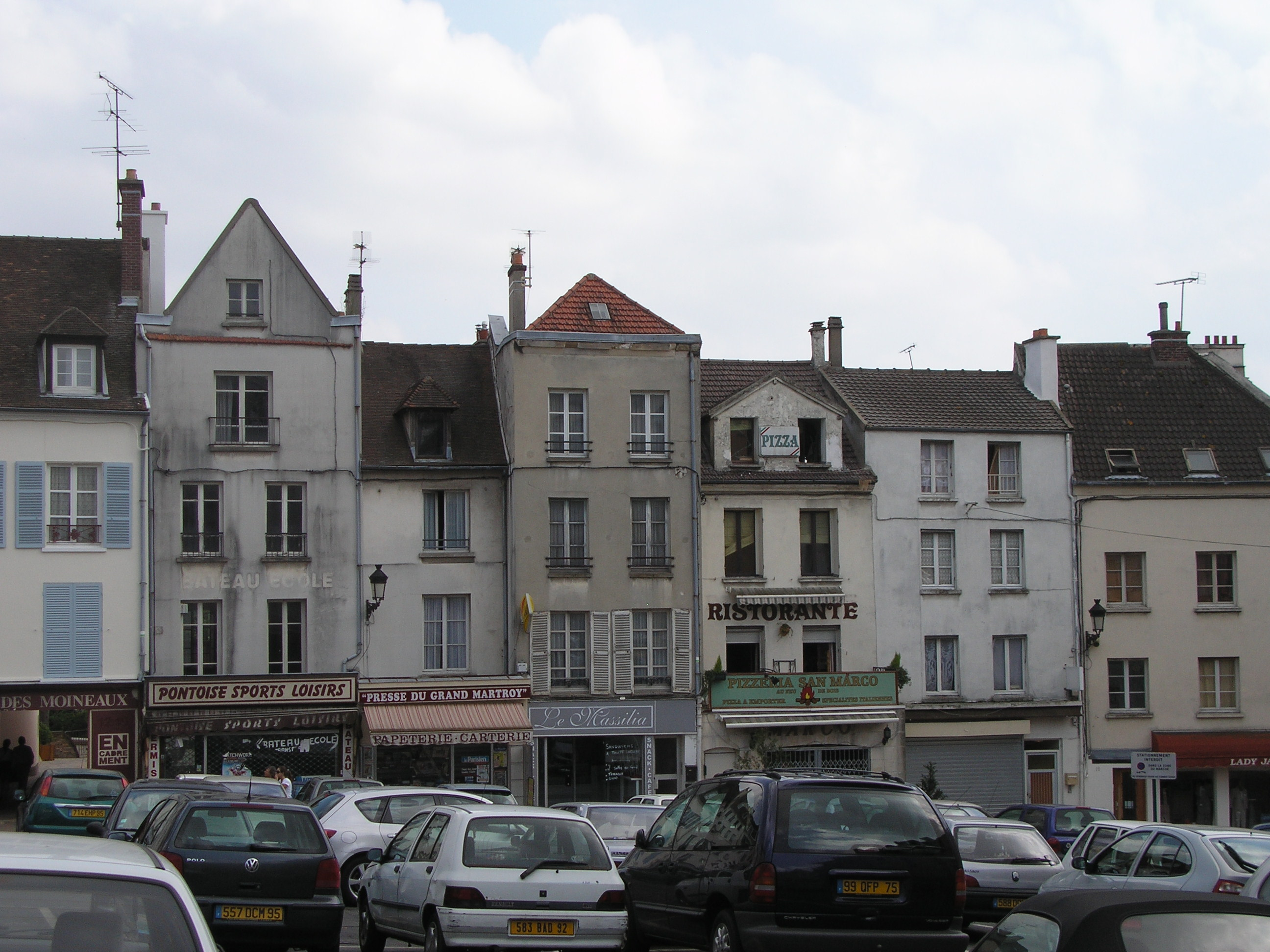 Maisons de la place du Grand-Martroy à Pontoise Photographie Oeuvre personnelle 2007